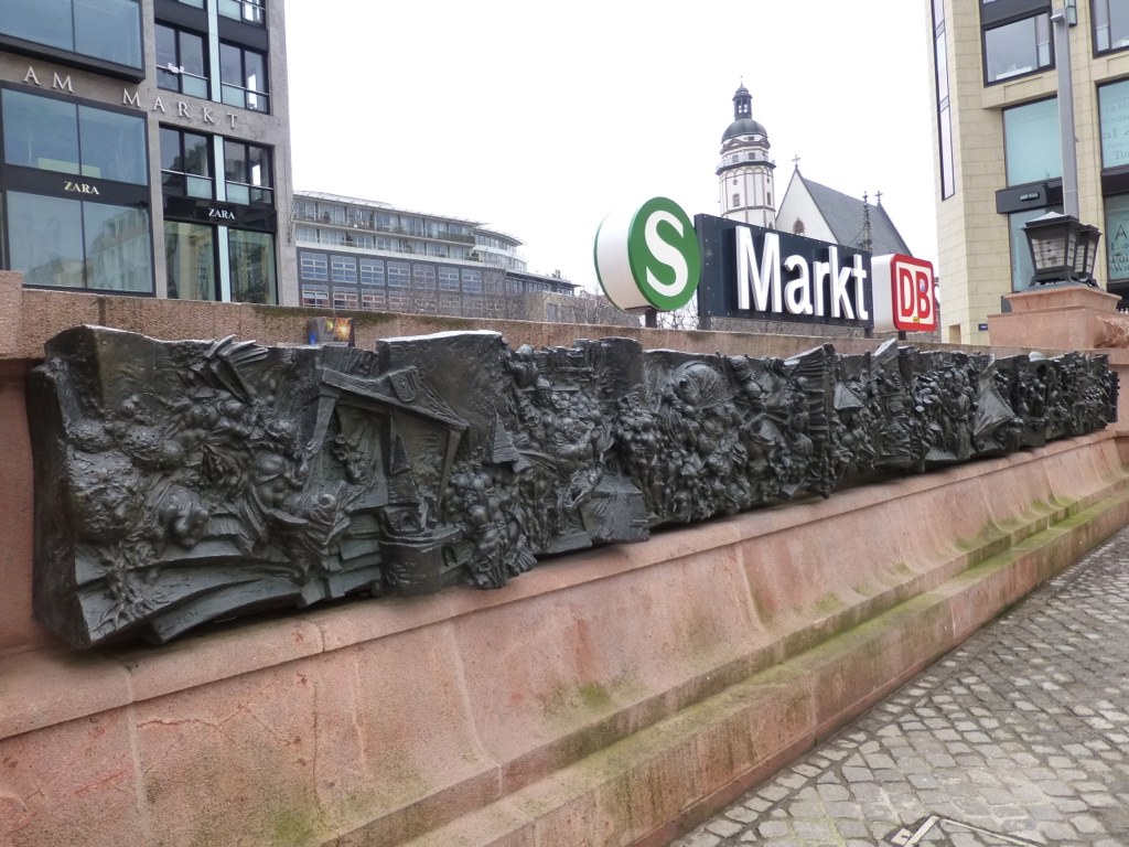 Kunst im öffentlichen Raum, Relief am Leipziger Marktplatz.